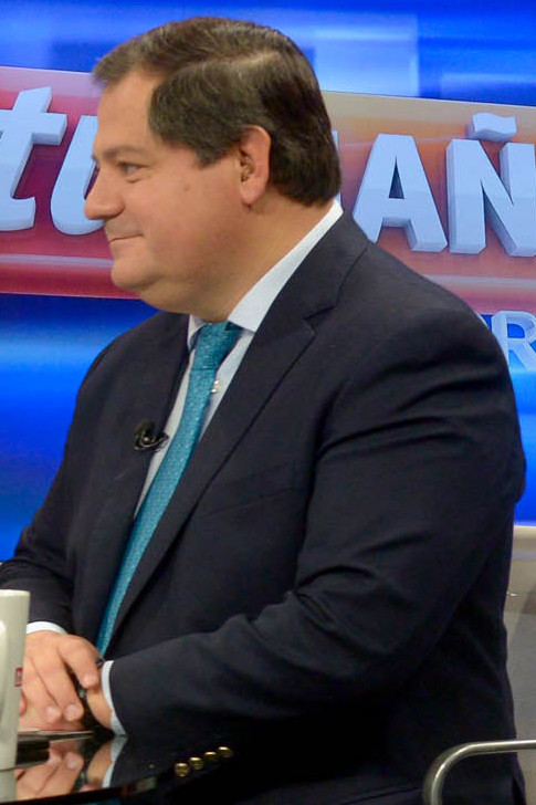 Ministro Díaz participa en noticiarios de Mega y TVN para explicar como se desarrolla el Proceso Constituyente